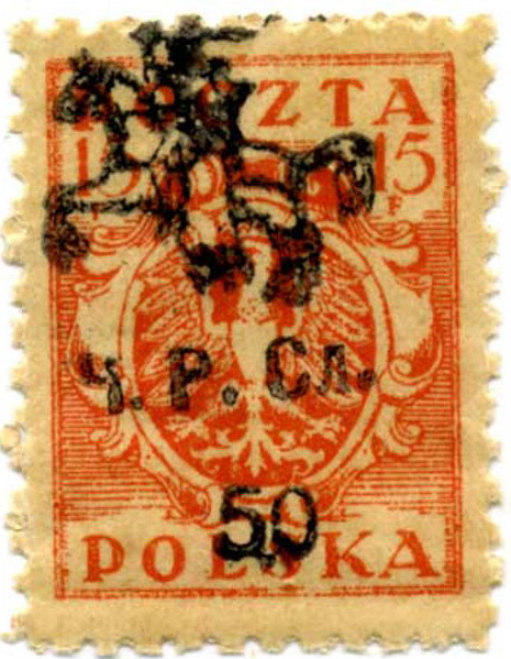 Беларуская (тарашкевіца): Марка Часовай Рады Случчыны вартасьцю 50 грошай